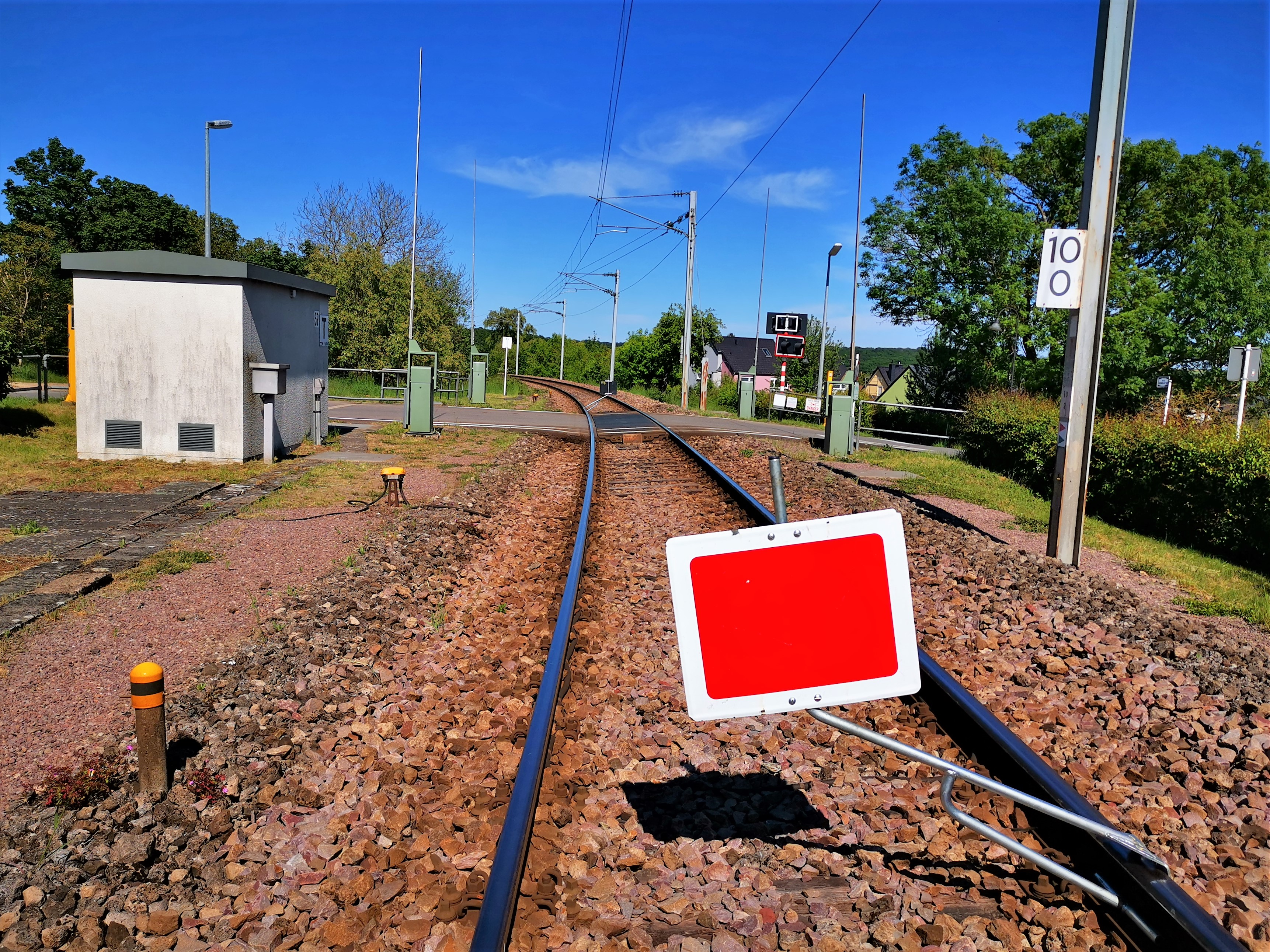 Luxembourg, près du passage à niveau PN59 à Moutfort, cité Ledenbierg. Vue en direction Est avec SMA (Signal mobile d'arrêt): Point à ne pas dépasser.